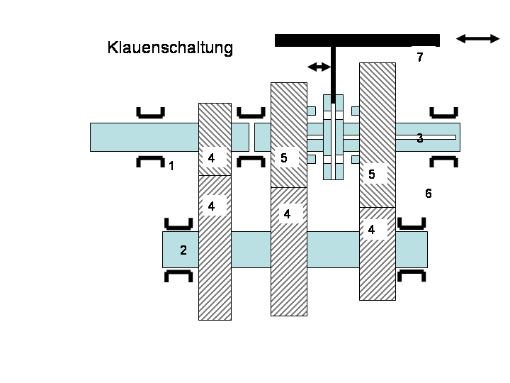 Skizze 1 einer Klauenschaltung